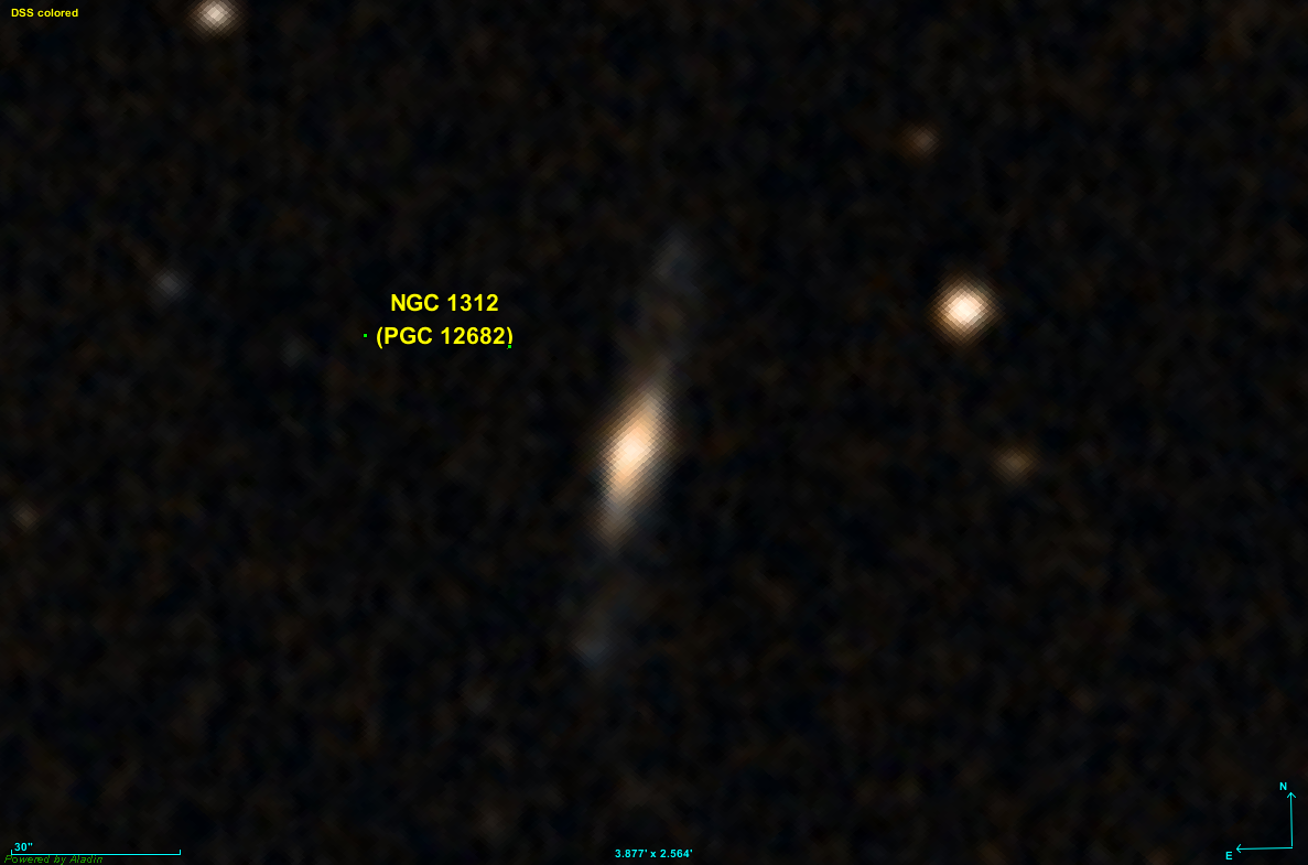 Image construite avec Aladin et les données de Digitized Sky Survey